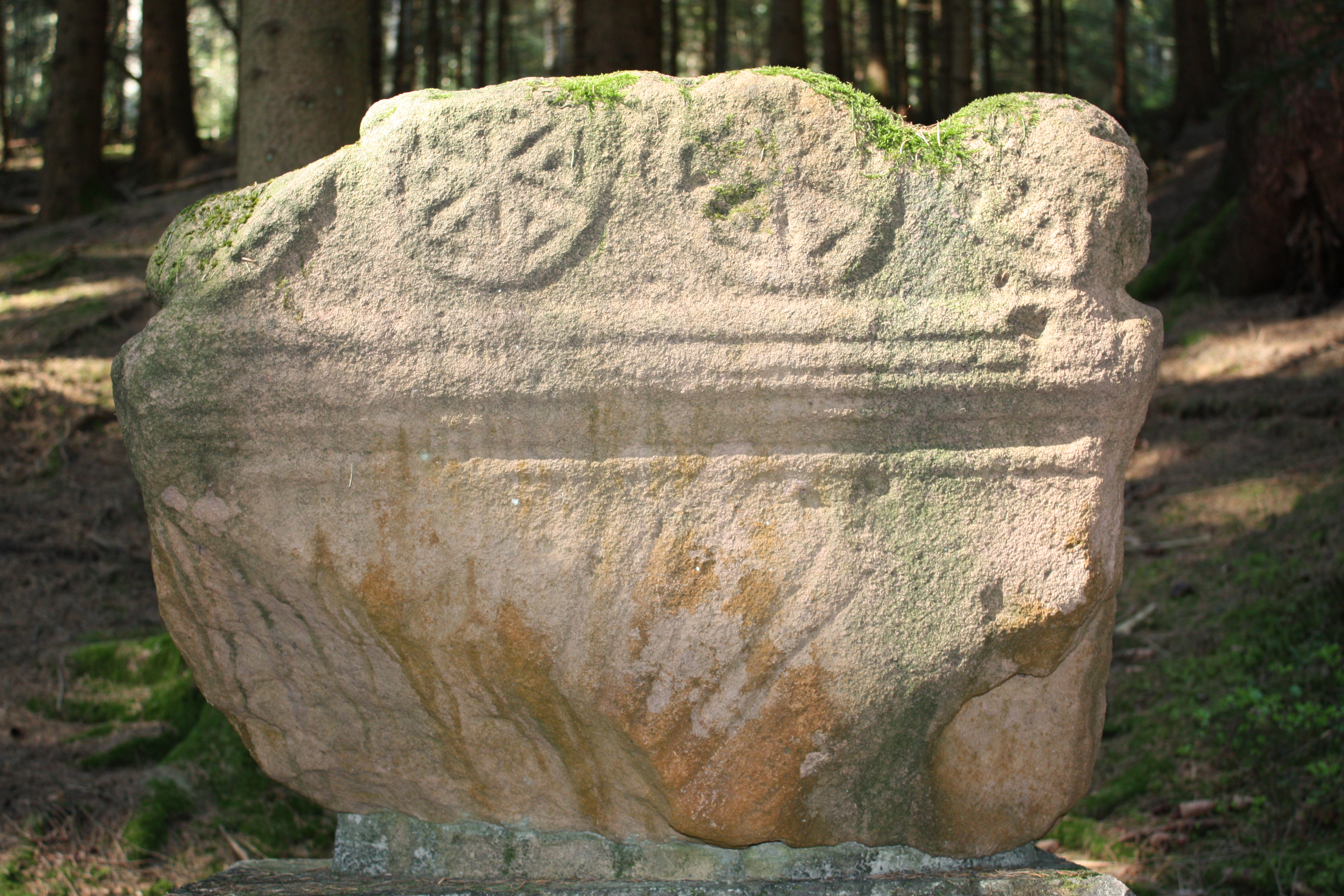 Limesanfang im Rotenbachtal (Schwäbisch Gmünd). Nachbildung eines römischen Altarsteines aus Stubensandstein, Original gefunden bei Ausgrabungsarbeiten der Reichs-Limeskommission 1895. Das 66 cm hohe und 86 cm breite Original befindet sich heute im Städtischen Museum Schwäbisch Gmünd.